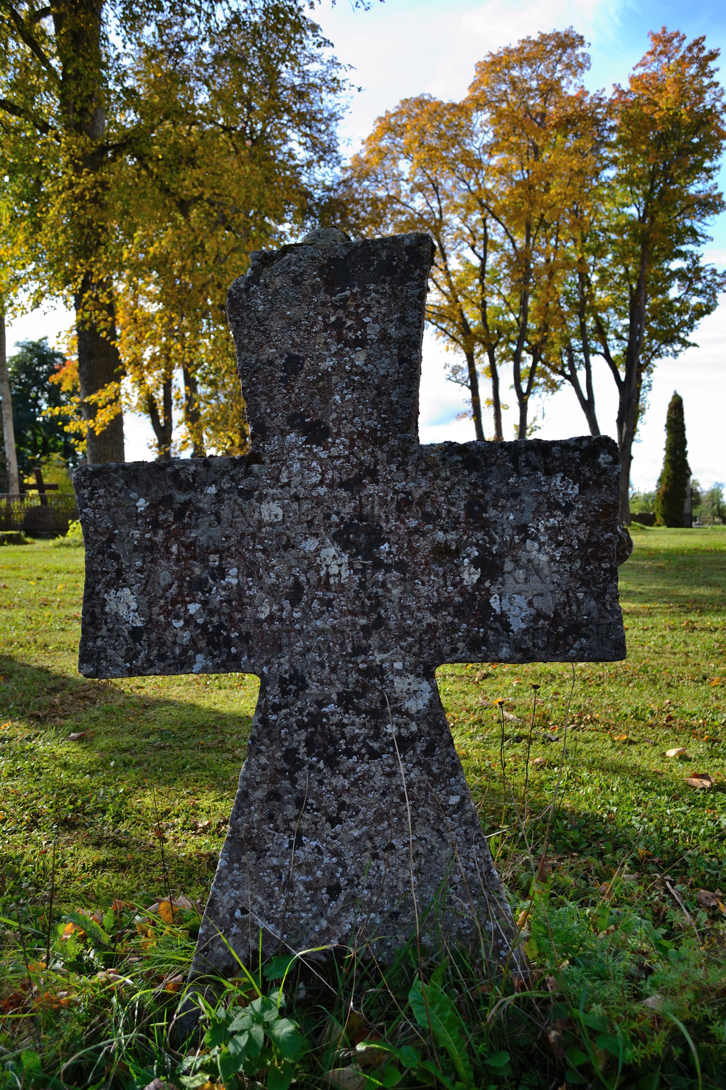 Paekivist rist, Juuru kirikuaed, 1652